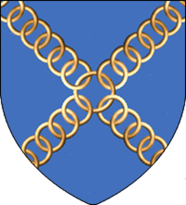 Blason de la Casa en la obra Cancion de Hielo y Fuego de G. R. R . Martin